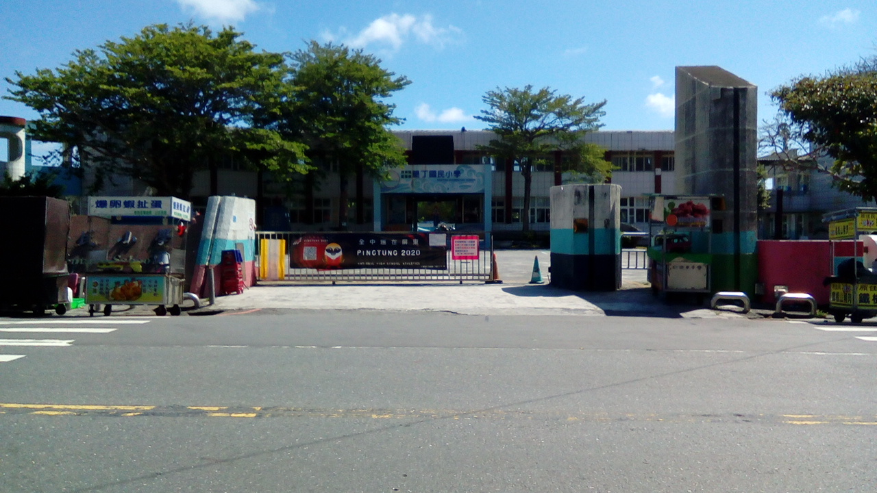 恆春鎮內的初級教育機構 位於墾丁大街東側